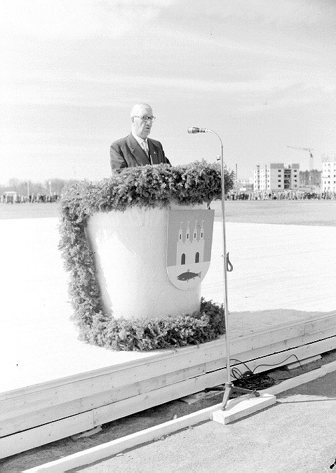 Otto Karhi (1876-1966) juhlapuhujana Oulun kaupungin 350-vuotisjuhlassa Raatin urheilukentällä toukokuussa 1955.